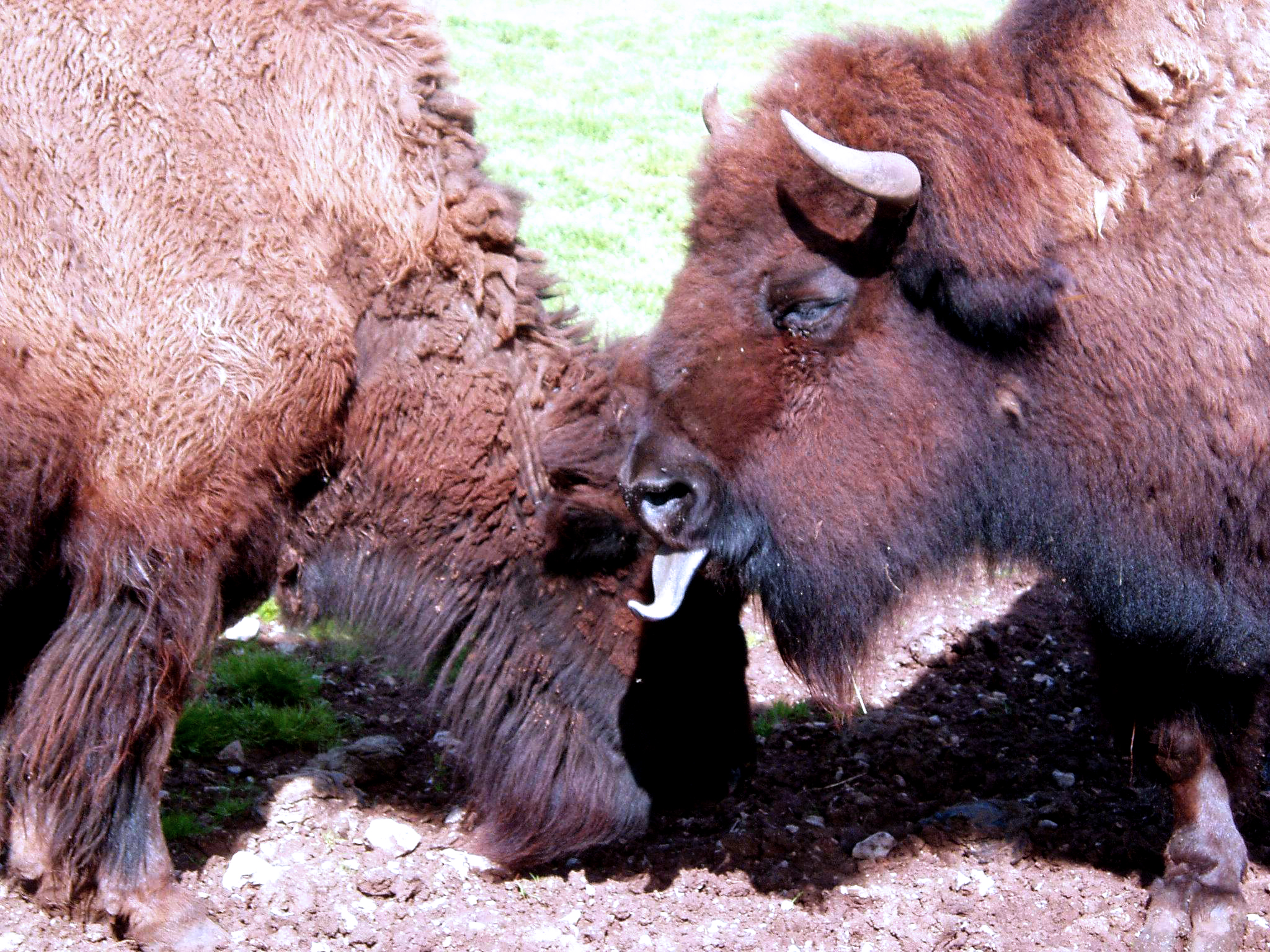 Bison bison, parc animalier de Gramat (Lot) / Gramat animal parc (Lot, France)